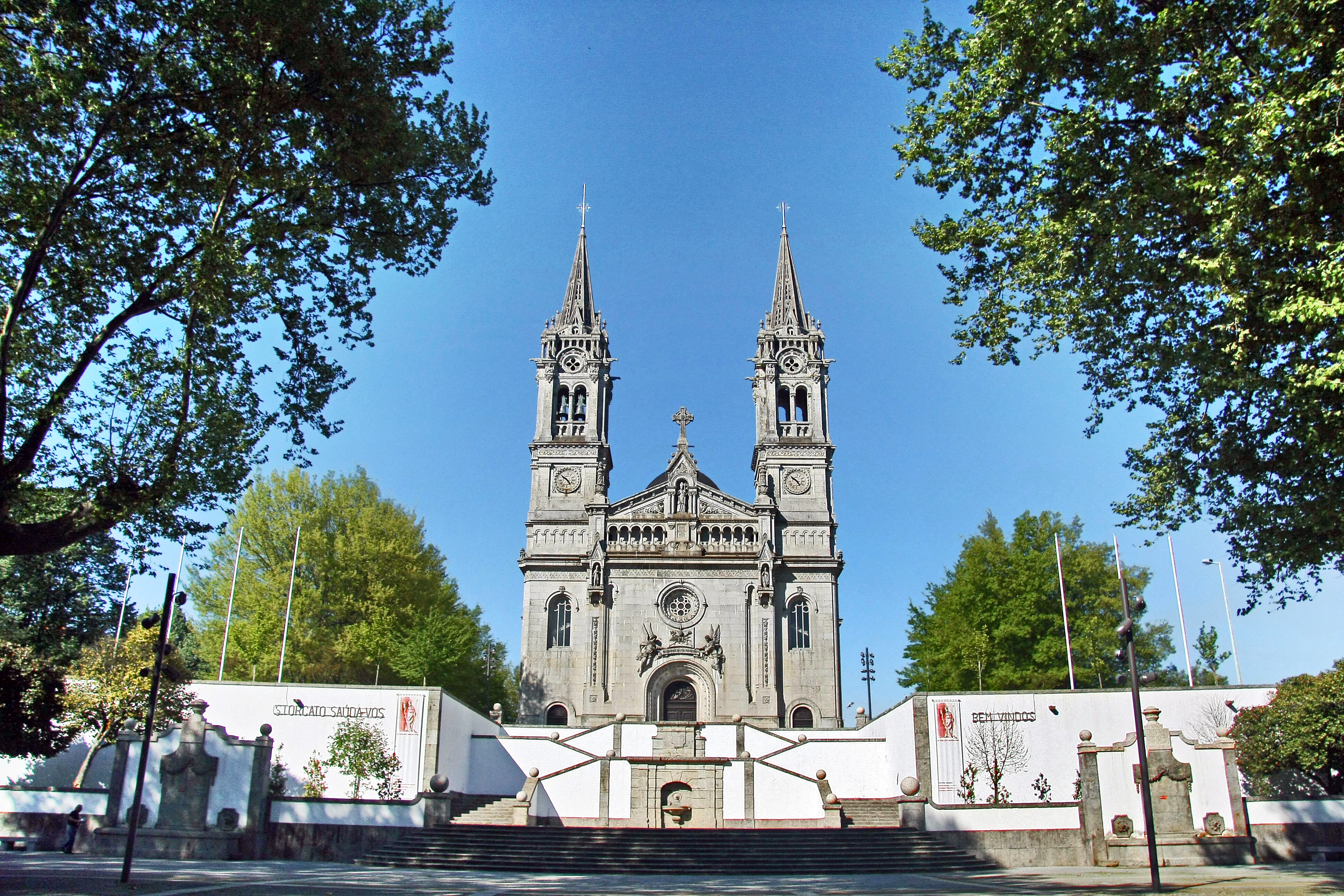 O Santuário de São Torcato é um santuário católico situado no vale central da freguesia de São Torcato (Guimarães), desenvolvendo-se à sua volta toda a povoação. O templo de estilo híbrido, com elementos clássicos, góticos, renascentistas e românticos, encontra-se todo construído em cantaria de pedra de granito da região, sendo uma obra-prima do neomanuelino, cuja construção se iniciou em 1871 e estende-se até aos dias de hoje. O gosto ecléctico, surge dentro do contexto da época, com predomínio de elementos decorativos neo-românicos. Possui dimensões consideráveis. A fachada é constituída por duas torres e um corpo central. Em planta, o templo tem a forma típica da cruz latina. No interior da Igreja encontra-se o corpo incorrupto do próprio São Torcato. No exterior do Santuário, encontra-se um adro o qual possui ao fundo, de frente para o Santuário, um parque enfeitado com frondosas tileiras e plátanos. Para aceder a este parque (denominado popularmente por Parque do Mosteiro), utiliza-se uma enorme escadaria, a qual dá ligação ao templo. No parque podemos também encontrar dois coretos, bem como duas grandes fontes de água.